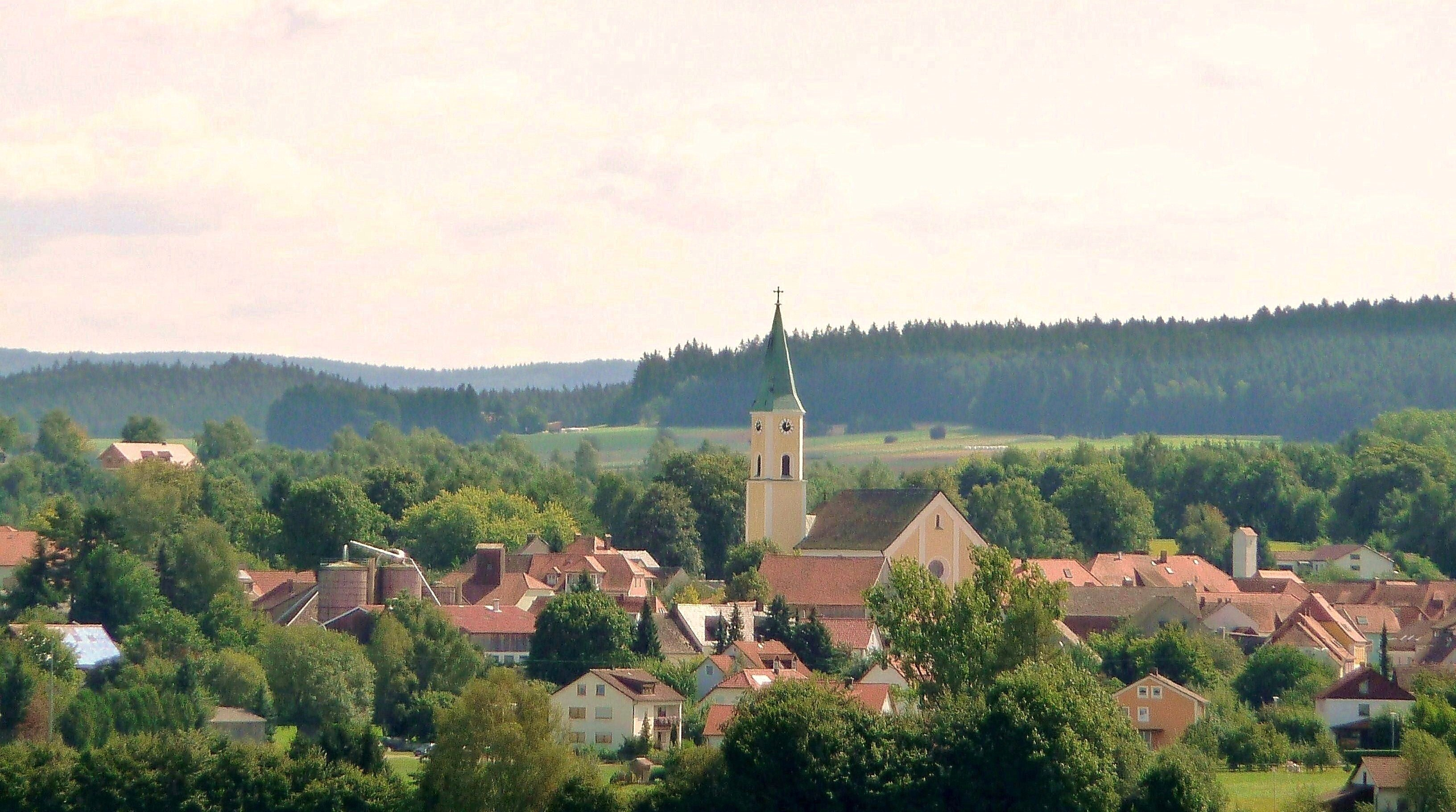 Blick auf Moosbach mit der Pfarrkirche